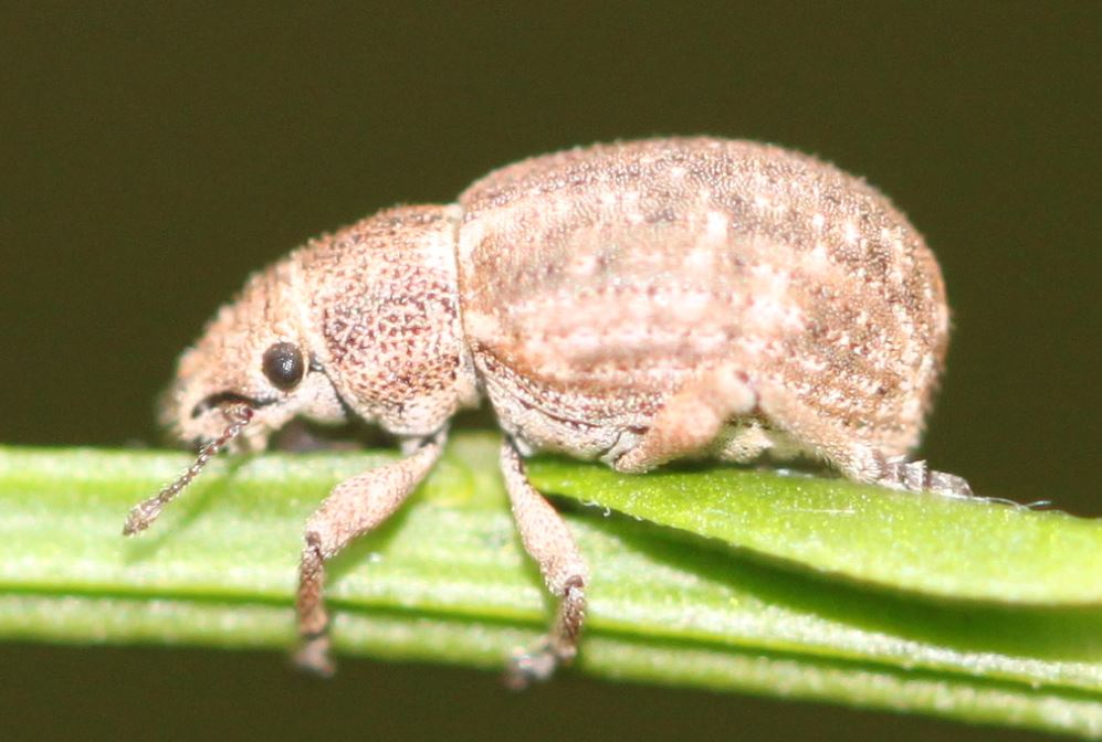 Rüsselkäfer Strophosoma capitatum am 4.10.2016 in der Schwetzinger Hardt